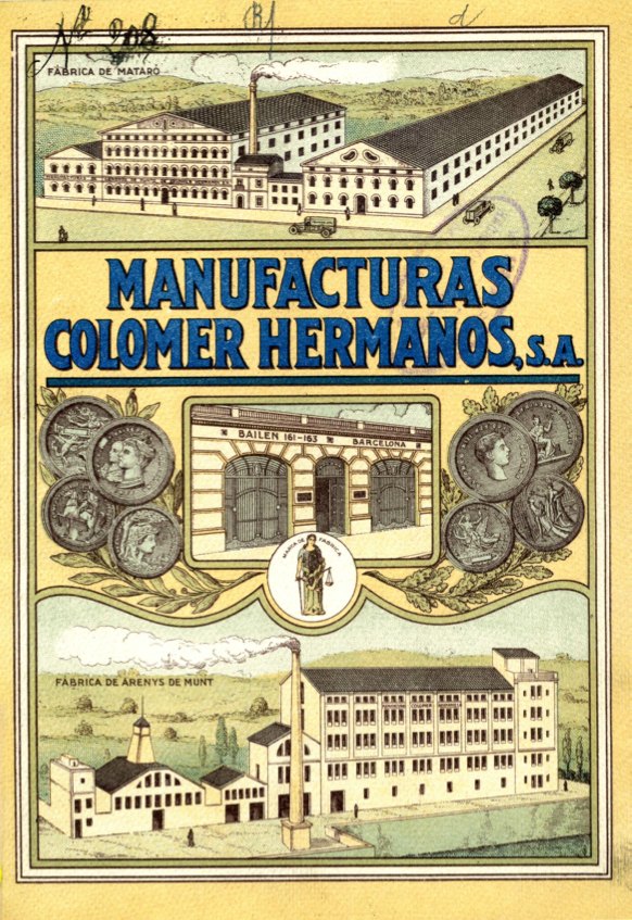 Junta de accionistas 1929